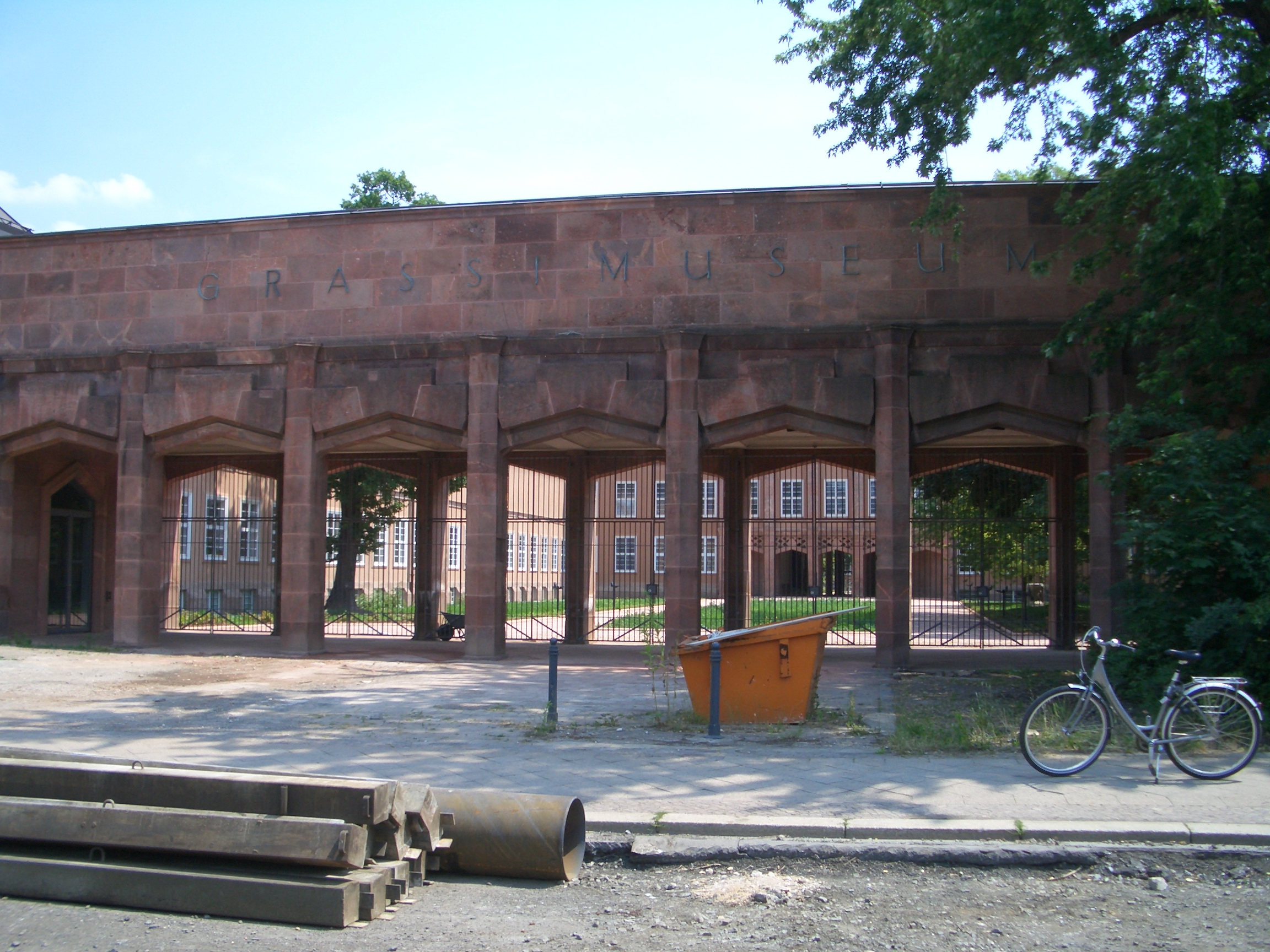 Eingang des Grassi-Museums Leipzig